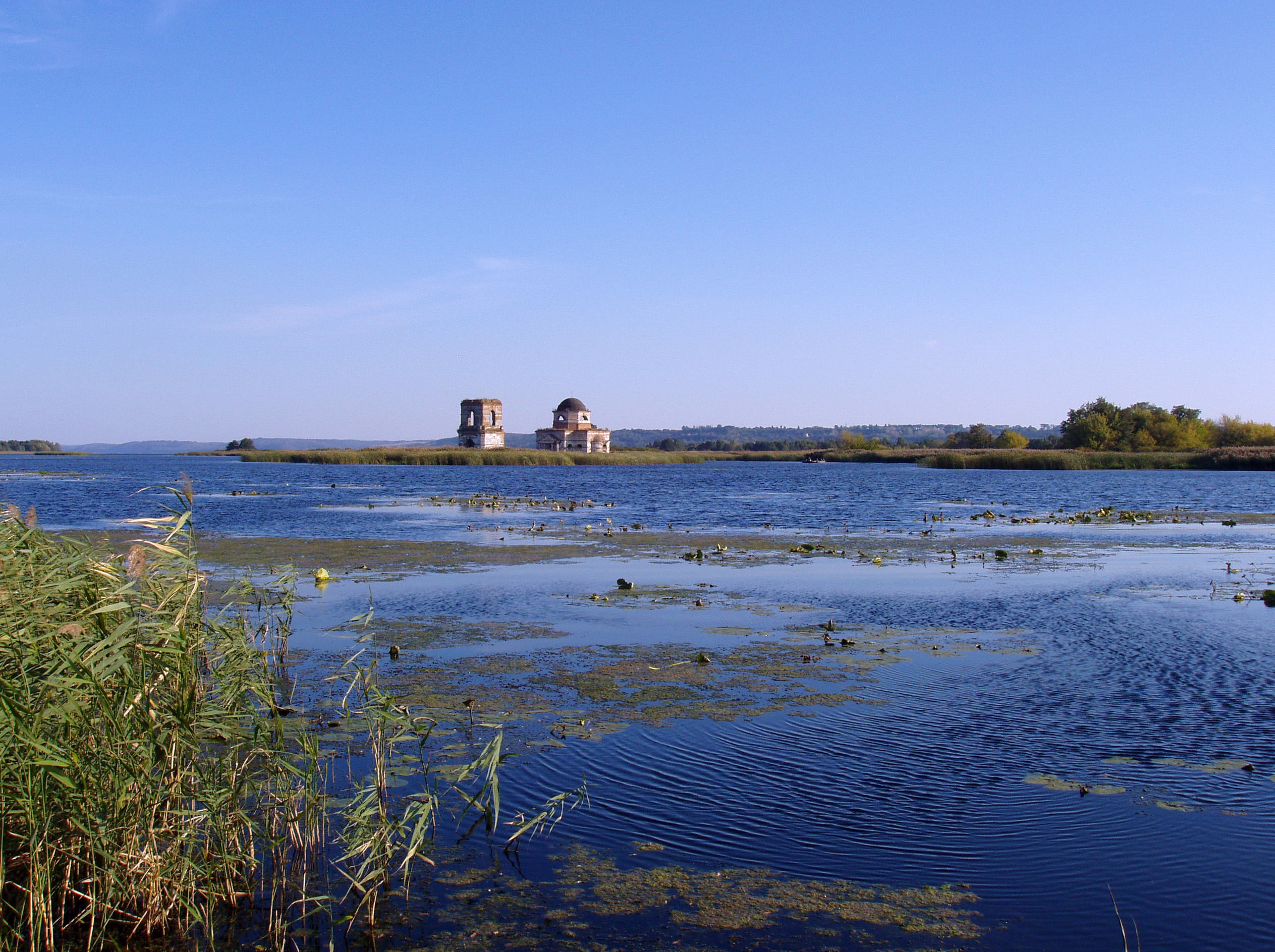 «Бориспільські острови», Бориспільський район, в межах акваторії та каскаду островів р. Дніпро на південний захід та на південь від с. Сошників